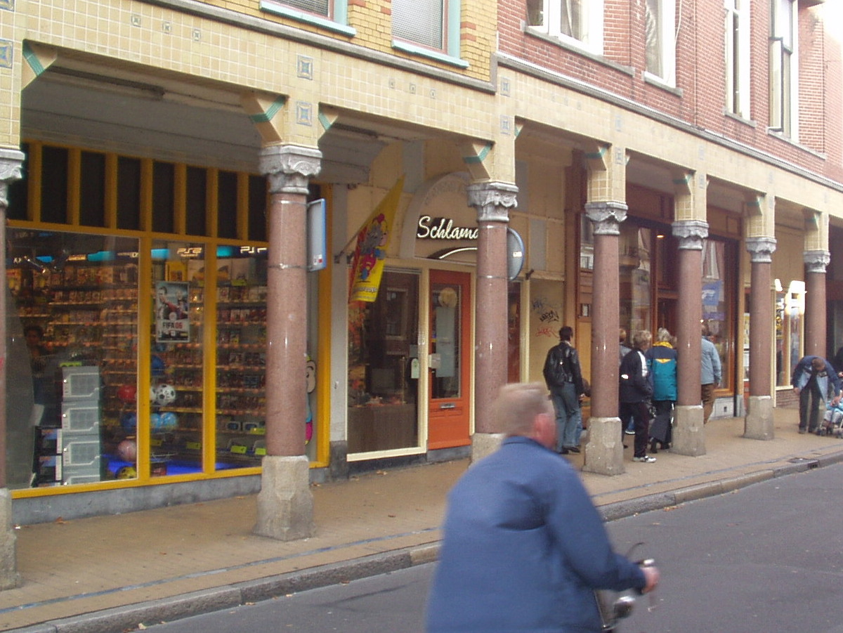 Nedersaksies: Winkelgallerieje in Grunningen.